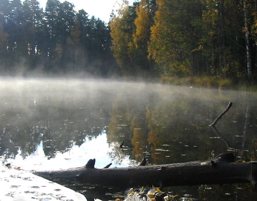 Udu oktoobris 2003 Põhja-Kõrvemaal, Paukjärve ääres.